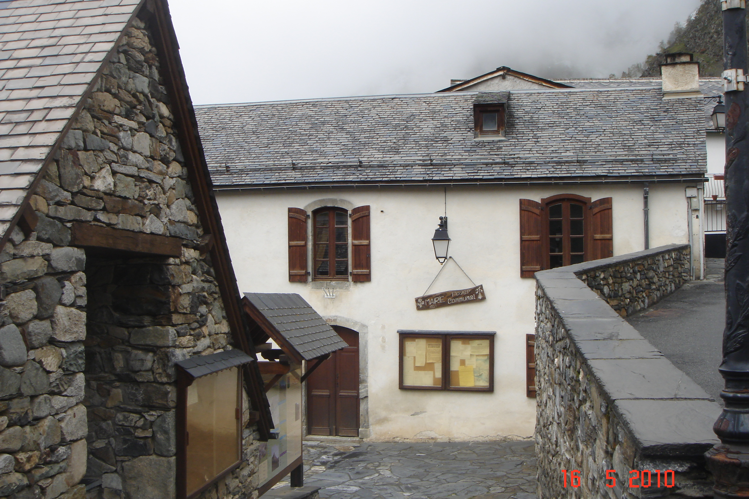 Sers - Pyrénées - Mairie